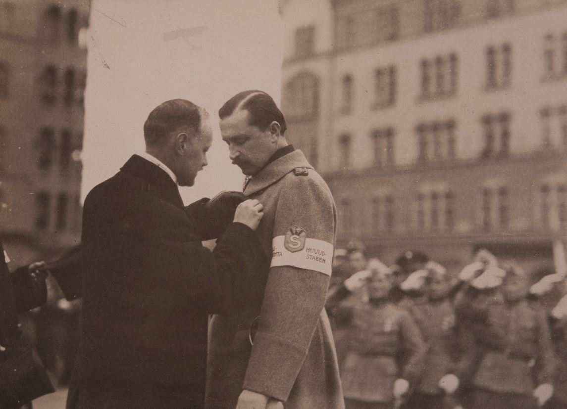 Arkkitehti Birger Federley luovuttaa kenraali Mannerheimille Tampereen valtauksen kunniamerkin Tampereen keskustorilla 1918